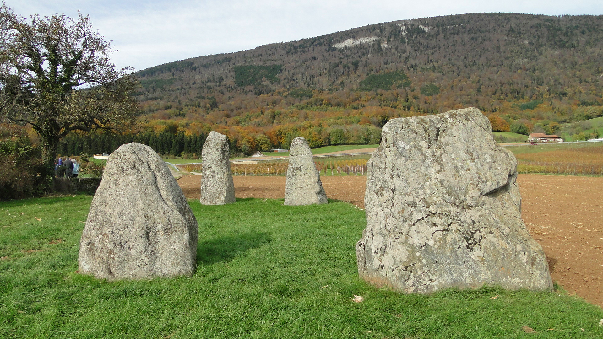 Die Menhire von Corcelles bei Corcelles-près-Concise, Kanton Waadt